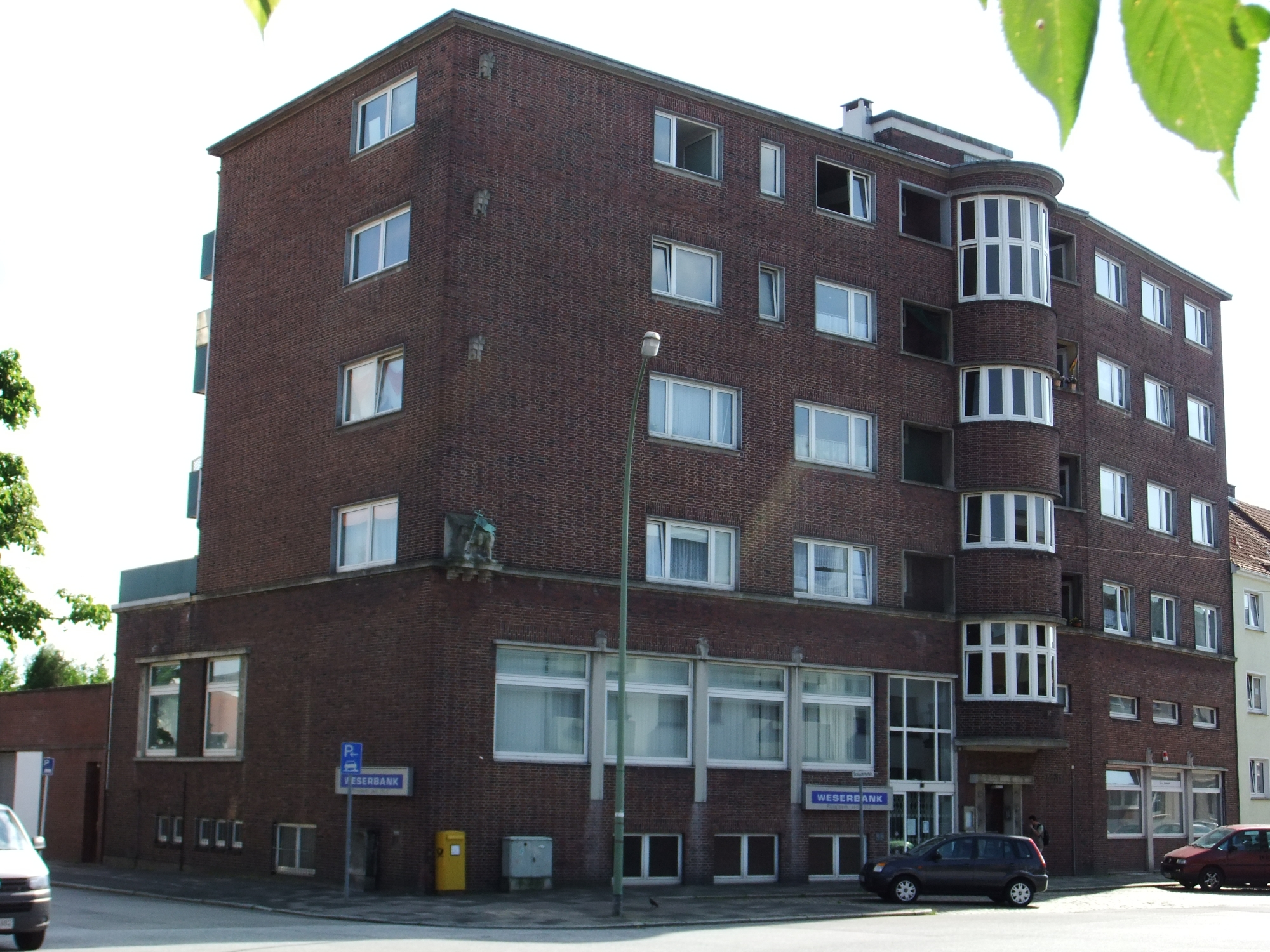 Viehmarktsbank in Bremerhaven, Schlachthofstraße 14. Das abgebildete Objekt ist ein geschütztes Kulturdenkmal in der Freien Hansestadt Bremen, mit der Nr. 1585 beim Landesamt für Denkmalpflege registriert.